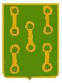 Escudo de la Casa de Traba